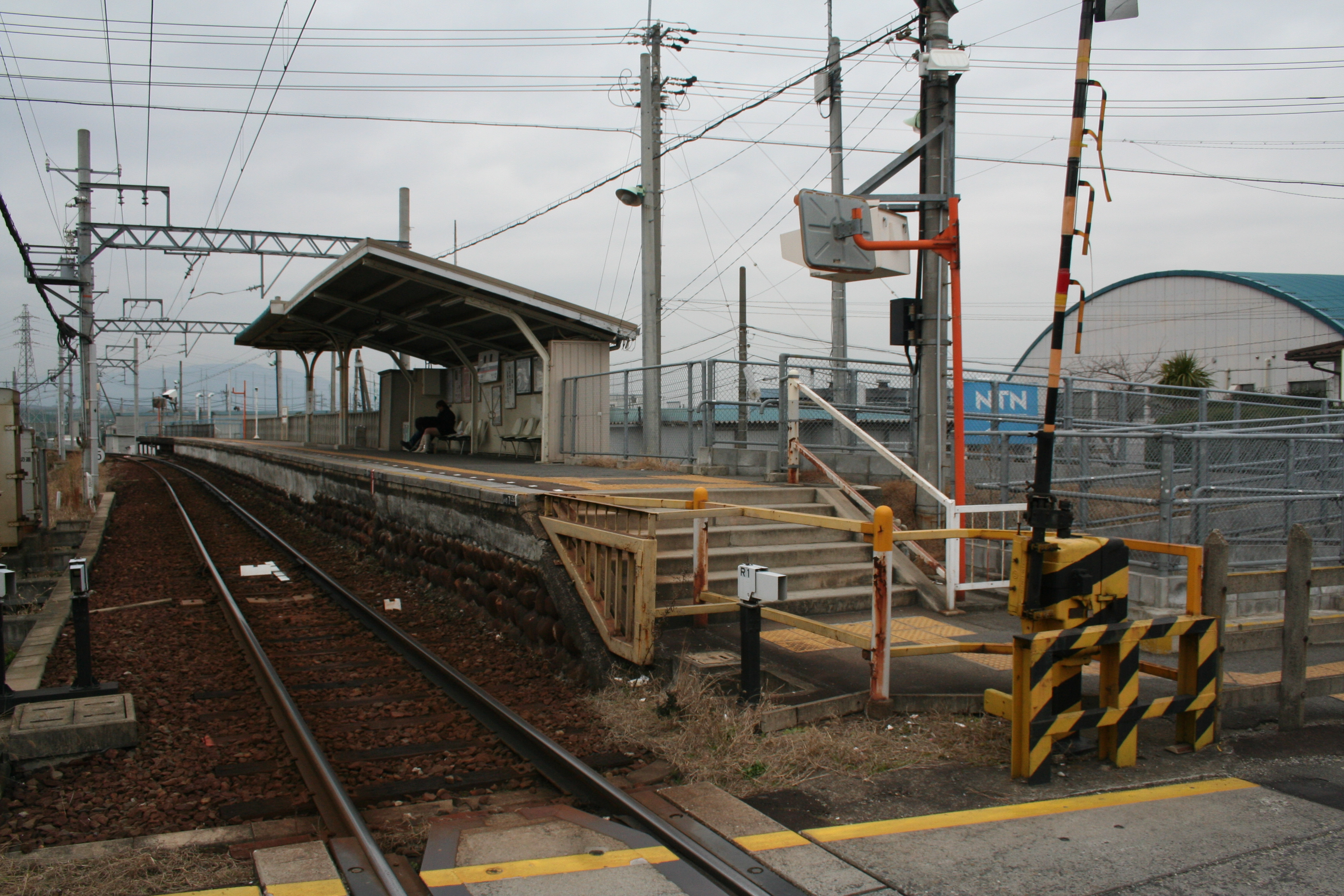 播磨駅